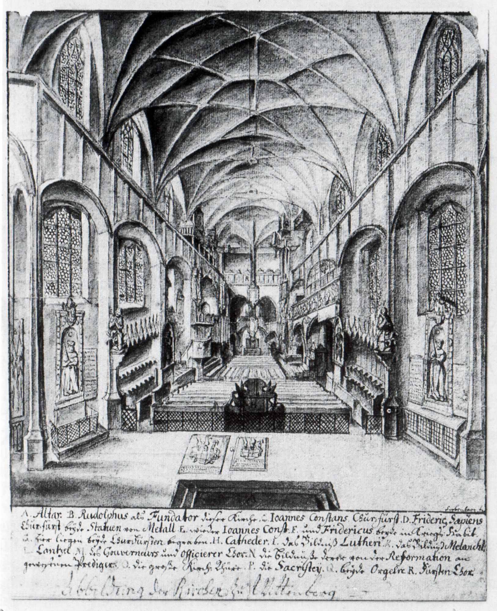 Das Innere der Wittenberger Schlosskirche um 1730